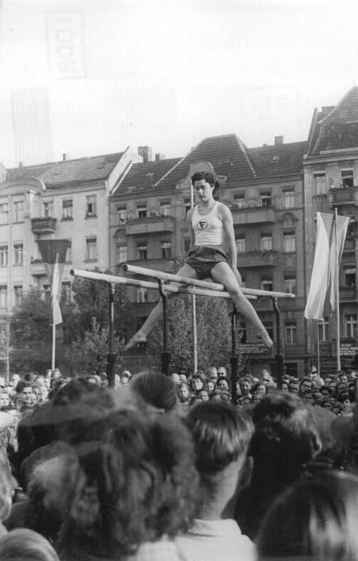 Berlin, 1. Mai, Boxhagener Platz, Turnvorführung Zentralbild Knobloch 1.5.52 Volksfeste am 1. Mai 1952 in Berlin. UBz: Sportübungen am Barren auf dem Boxhagener Platz.